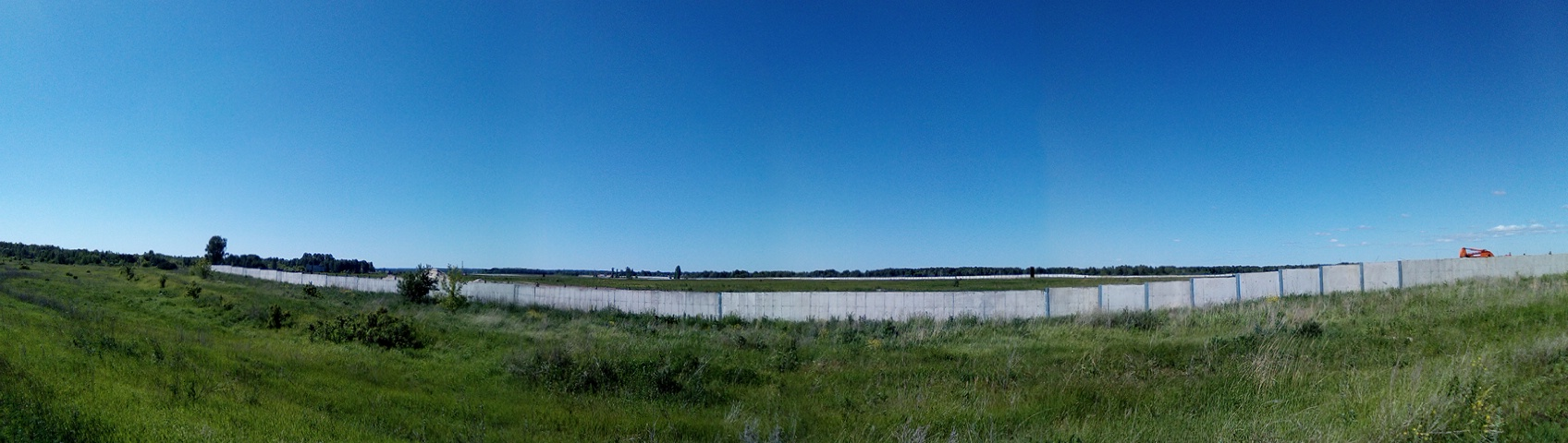 Аэродром Борисоглебское, Казань, створ ВВП